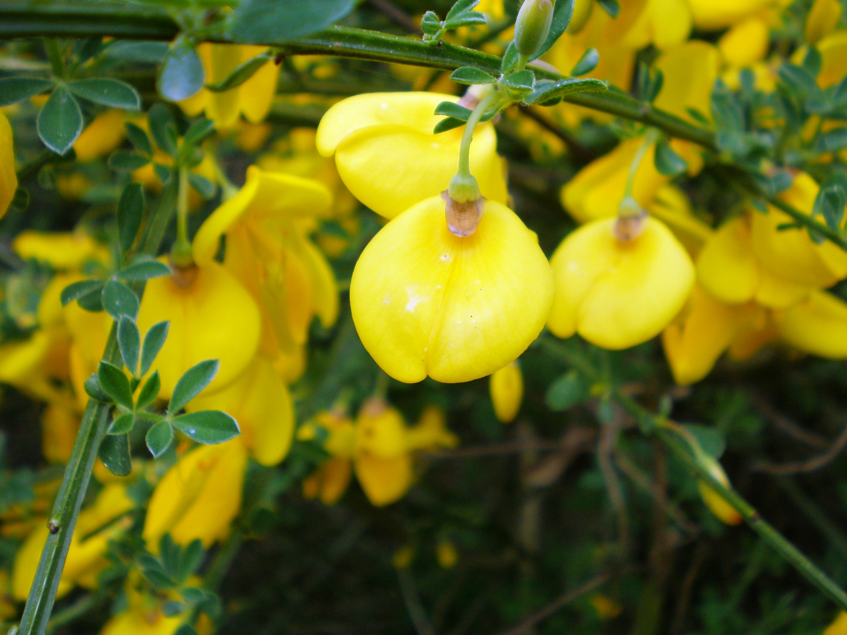 Cytisus scoparius